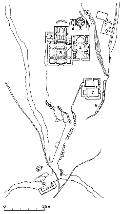 Makaravank Monastery in Armenia.